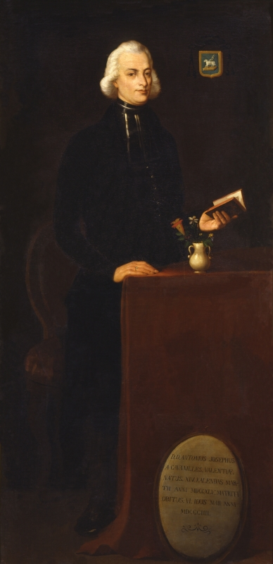 Retrato de Antonio José de Cavanilles (1745-1804), que fue un ilustrado, botánico y naturalista español.